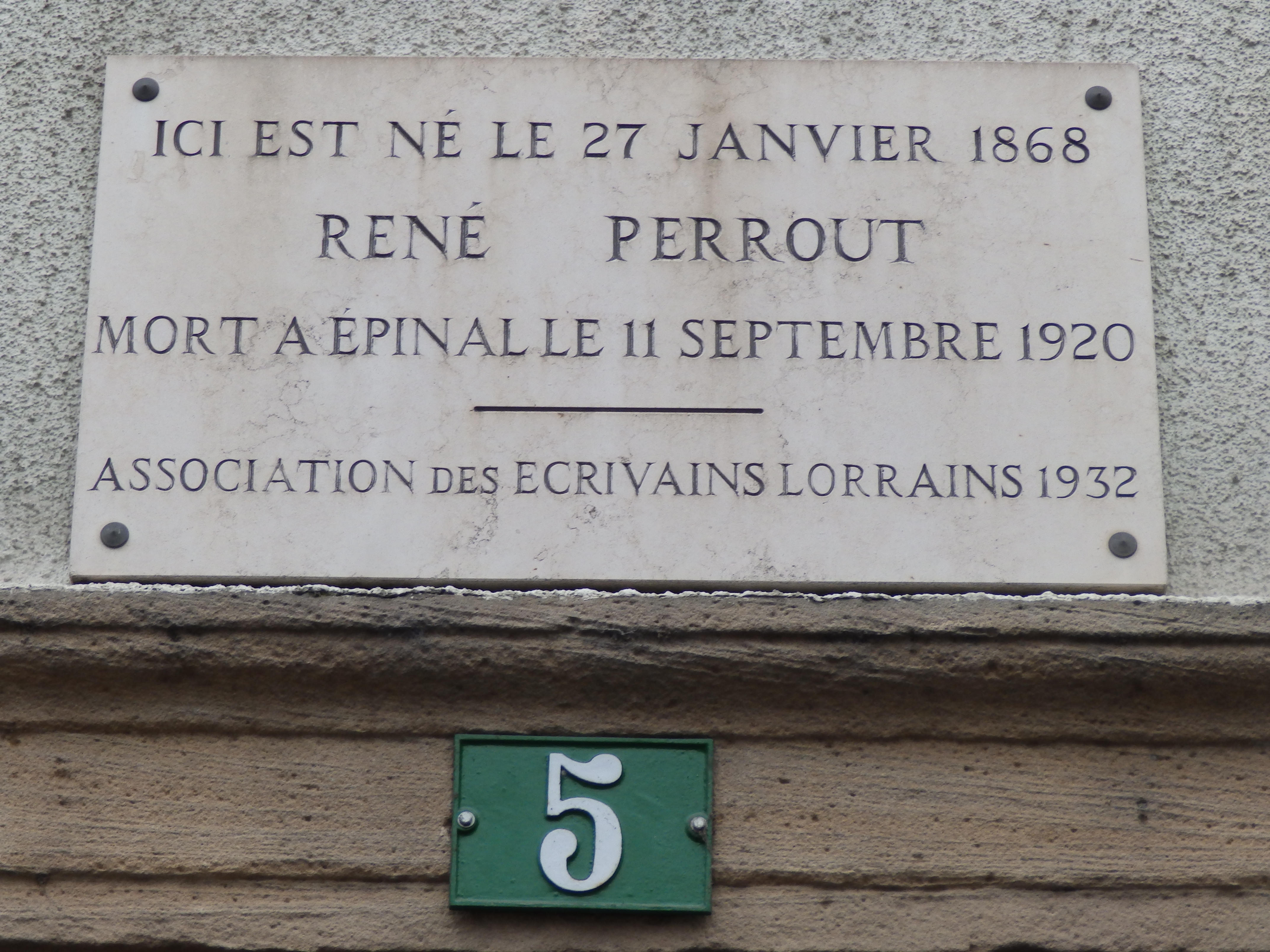 Plaque commémorative René Perrout 5 rue Raymond Poincaré à Epinal